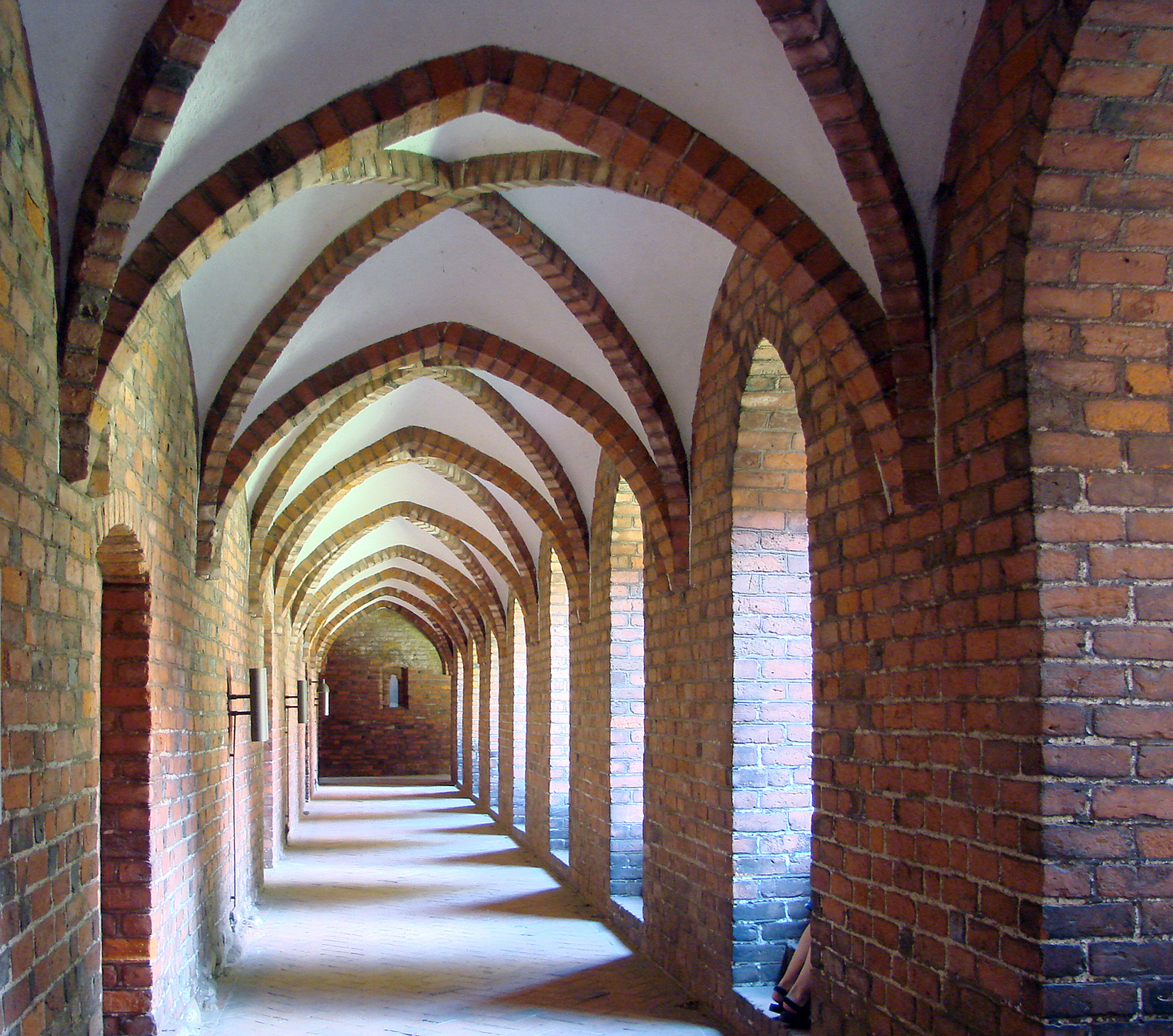 Klostergangen